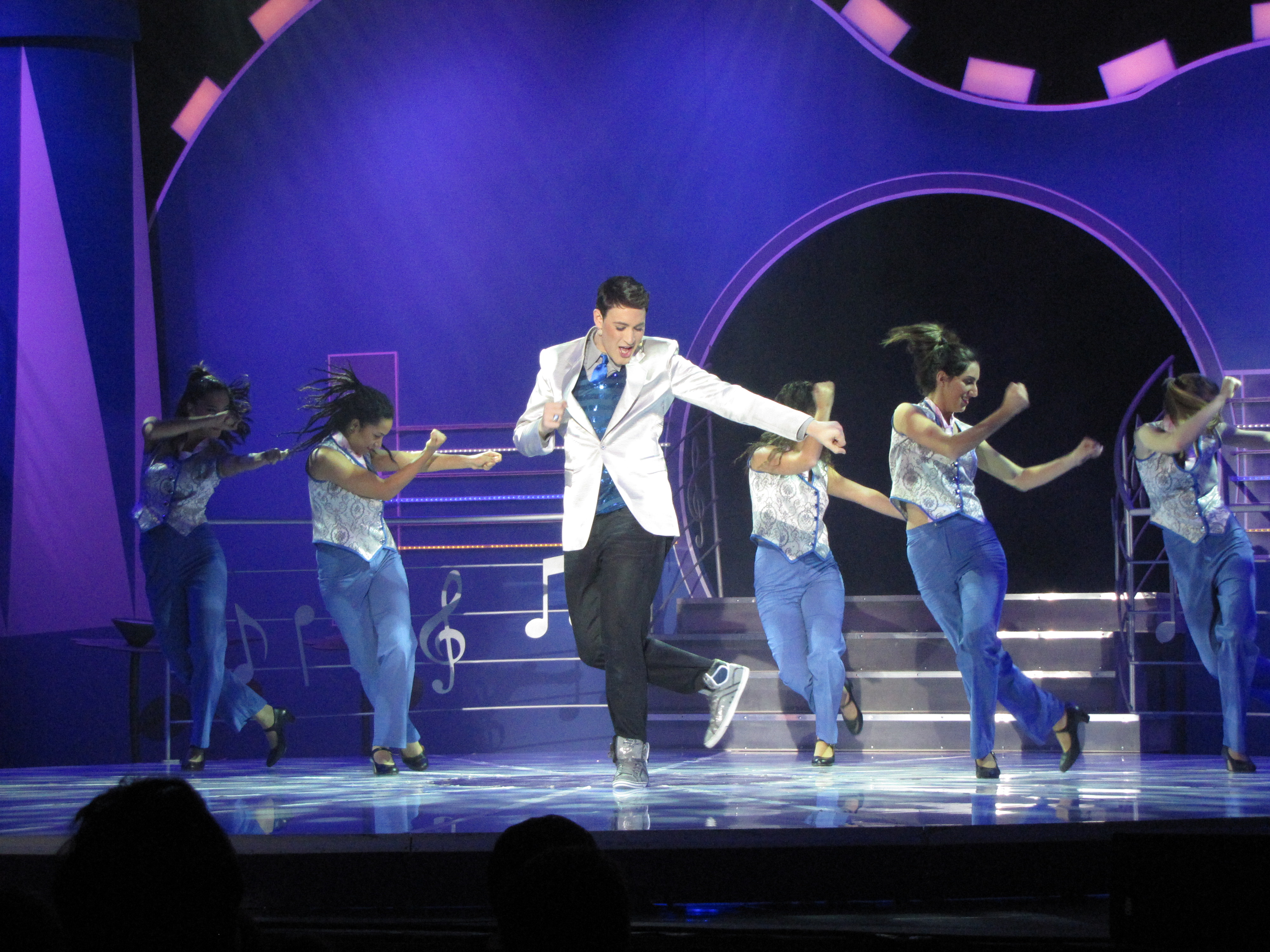 מתוך פסטיבל שירי ילדים